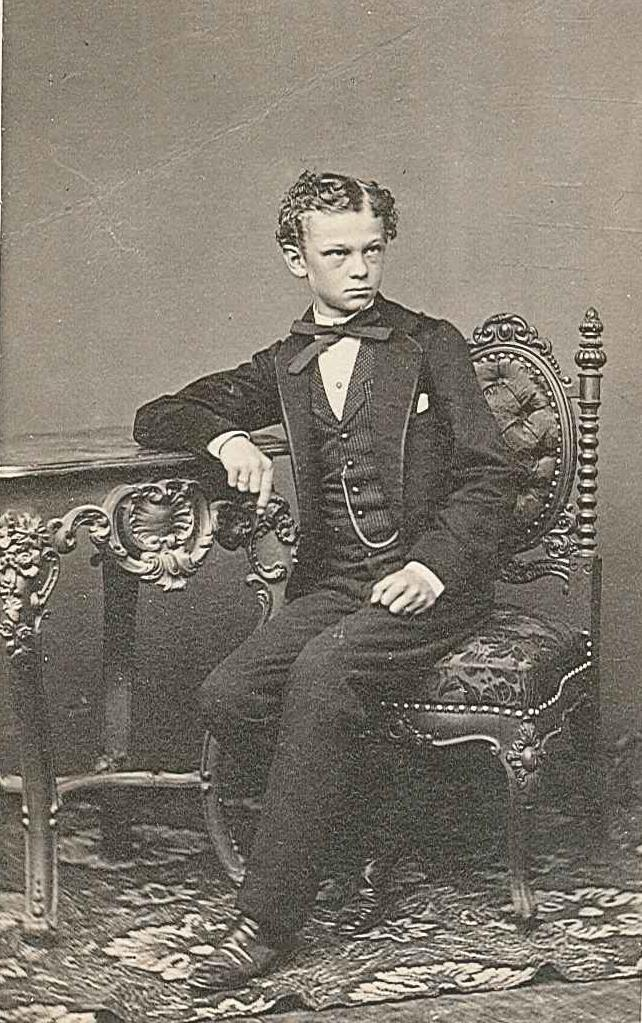 Prinz Max Emanuel in Bayern (1849-1893)